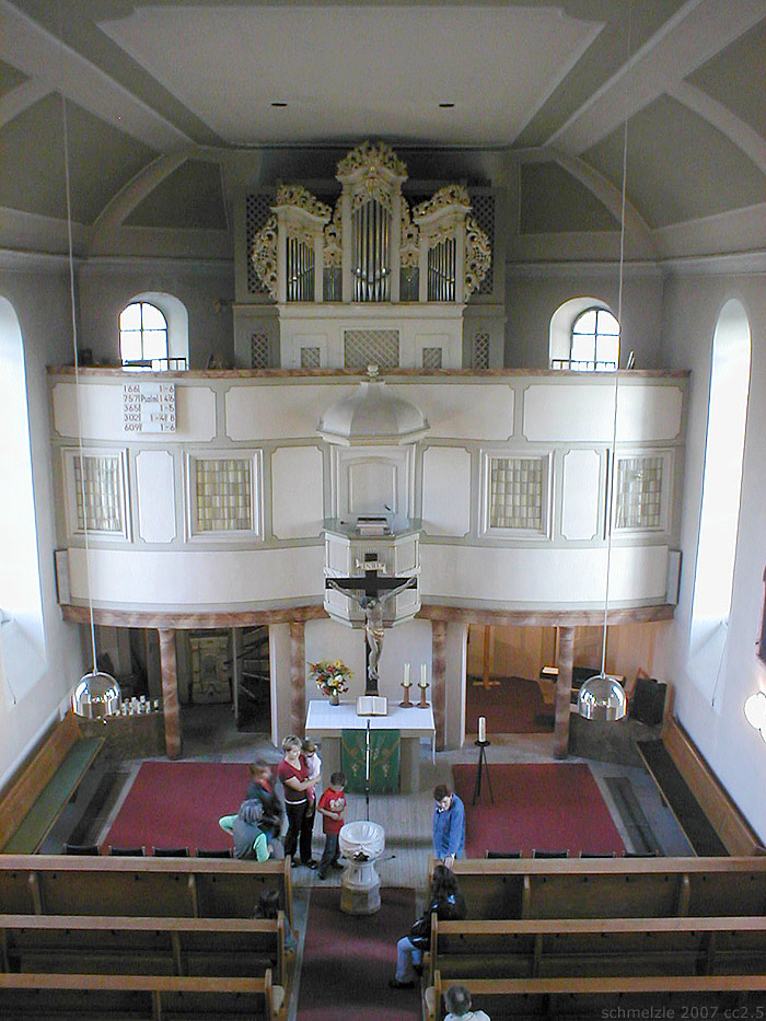 Blick von der Besucherempore zum Altarbereich und der Orgelempore der evang. Kirche in Bad Rappenau-Bonfeld, Baden-Württemberg, Deutschland